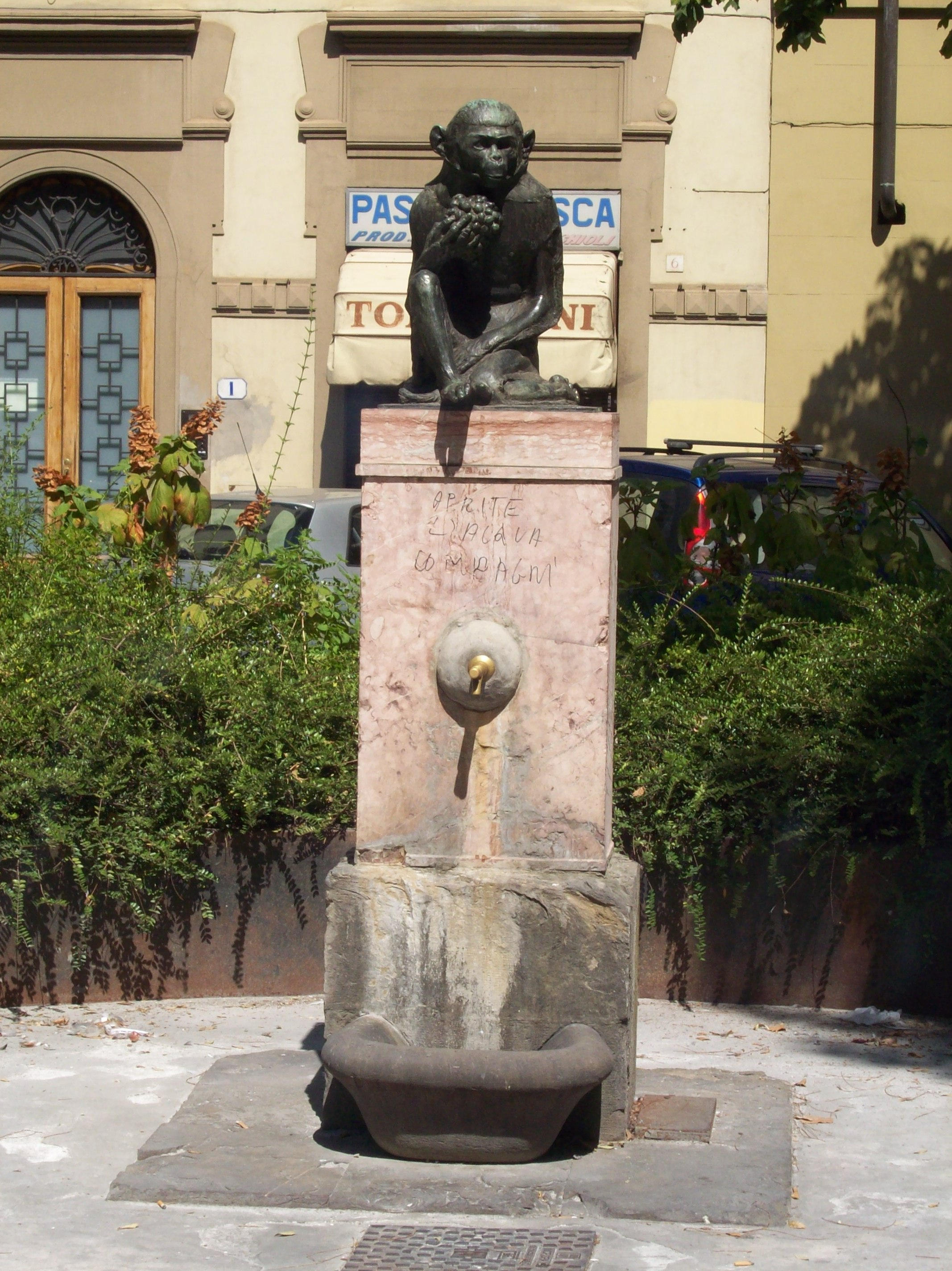 Statua della Scimmia di Giulio Cipirani